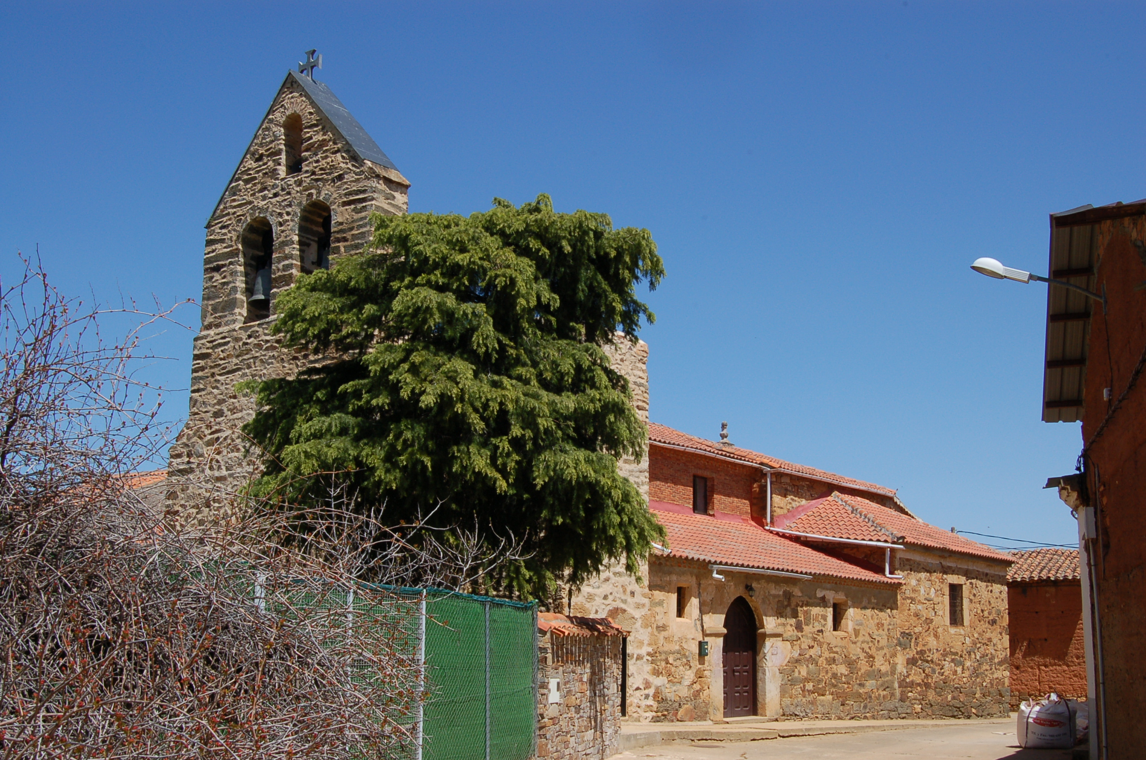 Igrexa de Villaferrueña